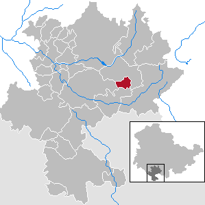 Brünn/Thür. in Thuringia - district Hildburghausen